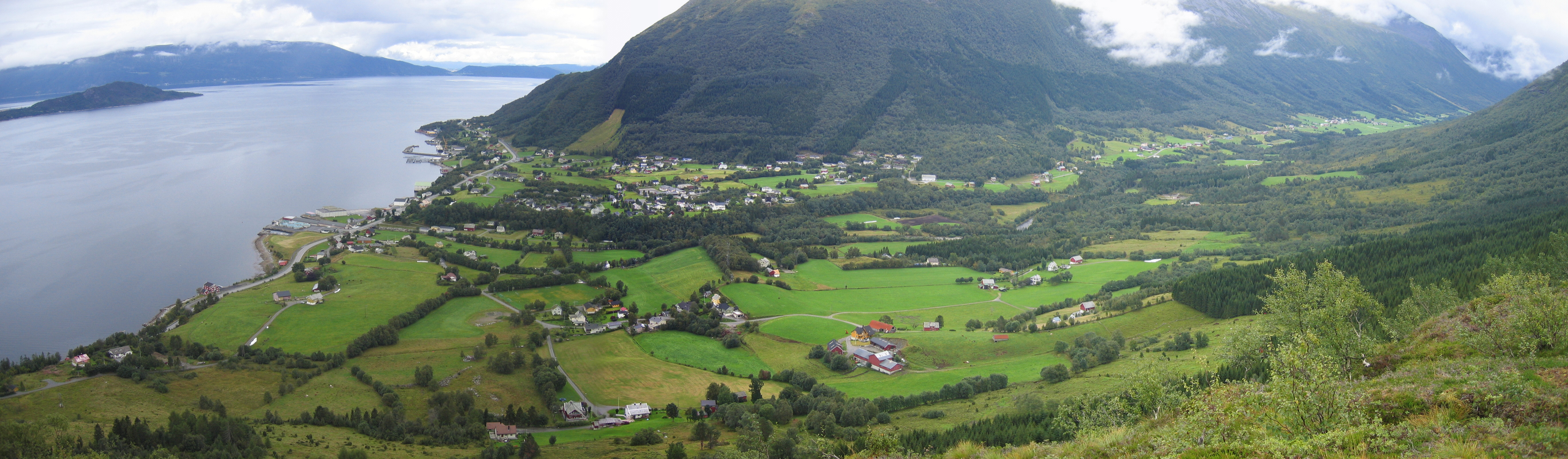 Vartdal med Vartdalsfjorden, Ørsta, Norge